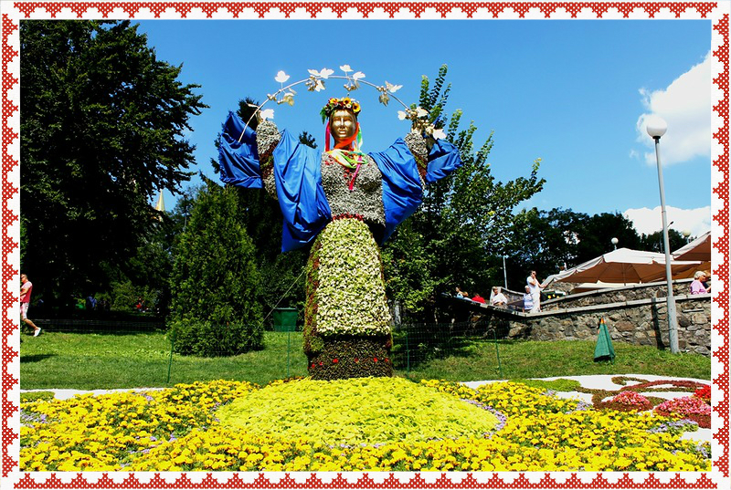 Щорічна виставка квіті у Києві (24 серпня - 19 вересня 2015 р.).